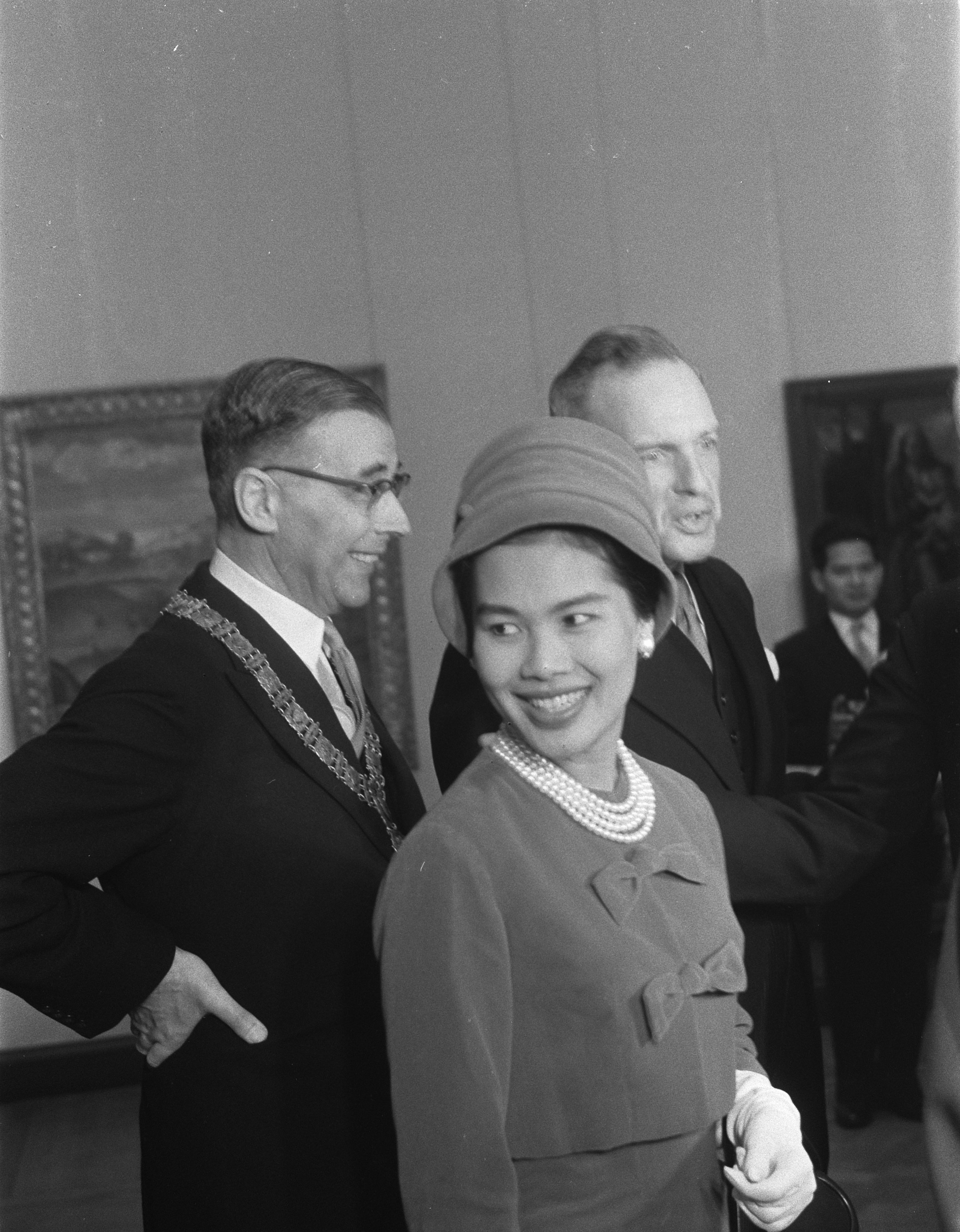 Collectie / Archief : Fotocollectie Anefo Reportage / Serie : [ onbekend ] Beschrijving : Staatsbezoek Koning en Koningin van Thailand , Rijksmuseum Datum : 24 oktober 1960 Locatie : Amsterdam, Noord-Holland Trefwoorden : staatsbezoeken Instellingsnaam : Rijksmuseum Fotograaf : Pot, Harry / Anefo Auteursrechthebbende : Nationaal Archief Materiaalsoort : Negatief (zwart/wit) Nummer archiefinventaris : bekijk toegang 2.24.01.05 Bestanddeelnummer : 911-6964